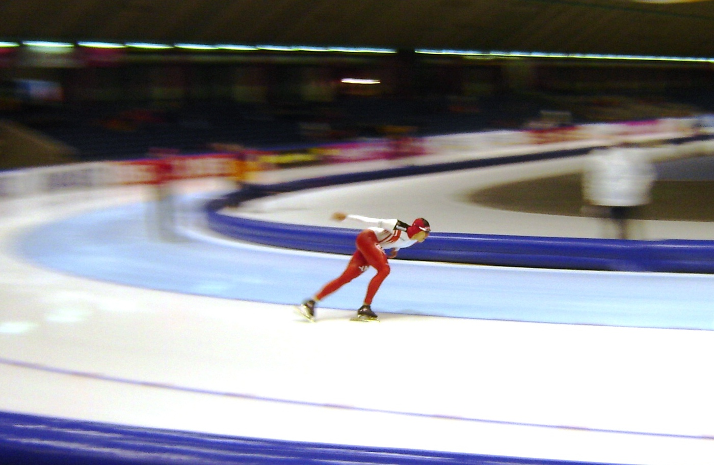 Description Artur Waś tijdens de wereldbekerwedstrijden 2006 in Thialf Date12 November 2006SourceOwn workAuthorR.A. Smit Artur Waś tijdens de wereldbekerwedstrijden 2006 in Thialf